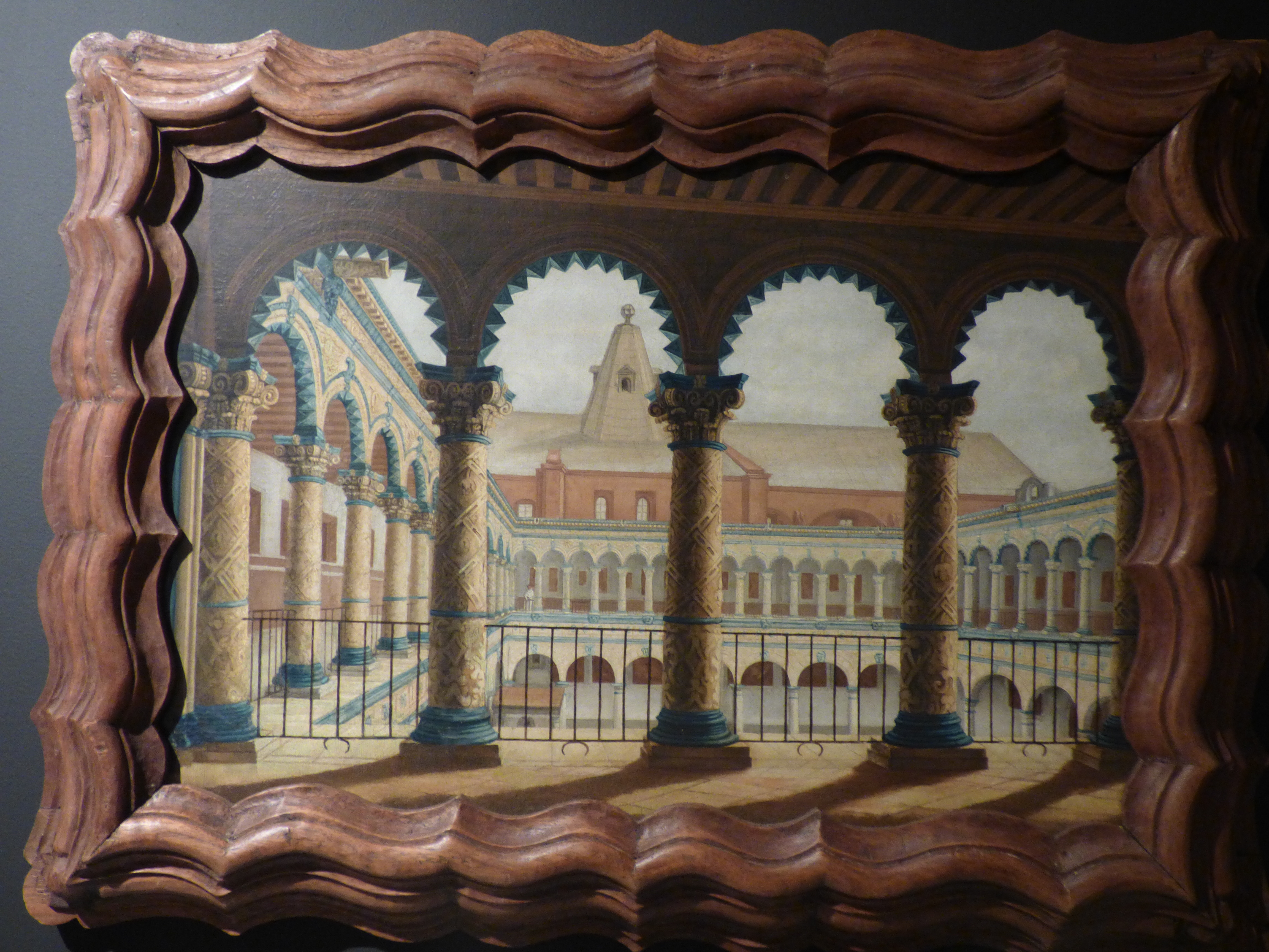 Claustro del convento de Nuestra Señora de la Merced, de Pietro Gualdi (en el Museo Soumaya Loreto)